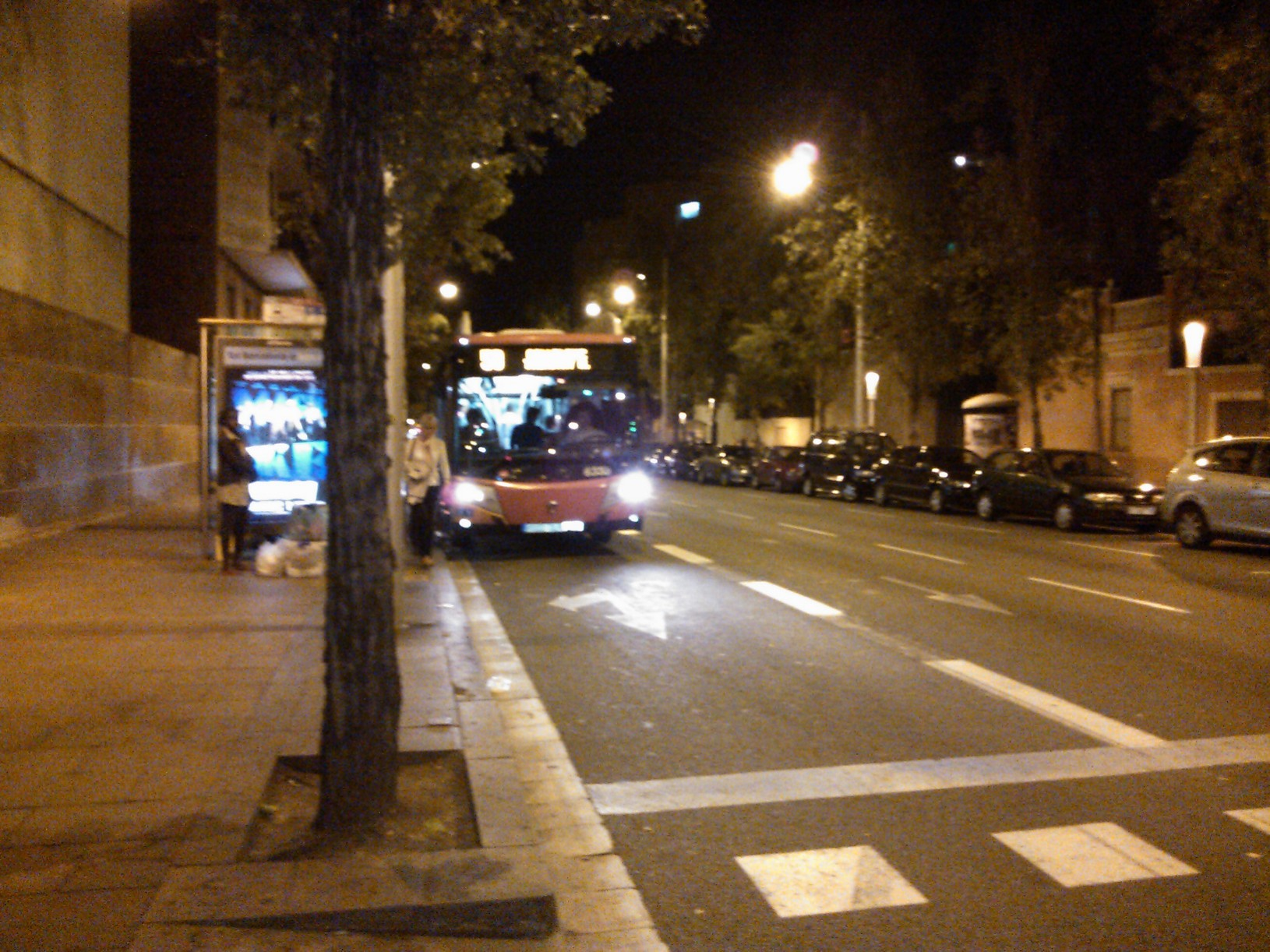 Autobús urbà de Barcelona